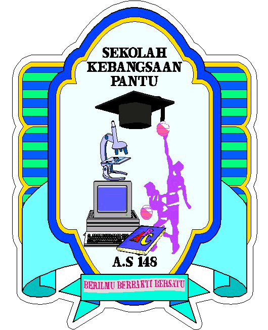 Logo SK Pantu